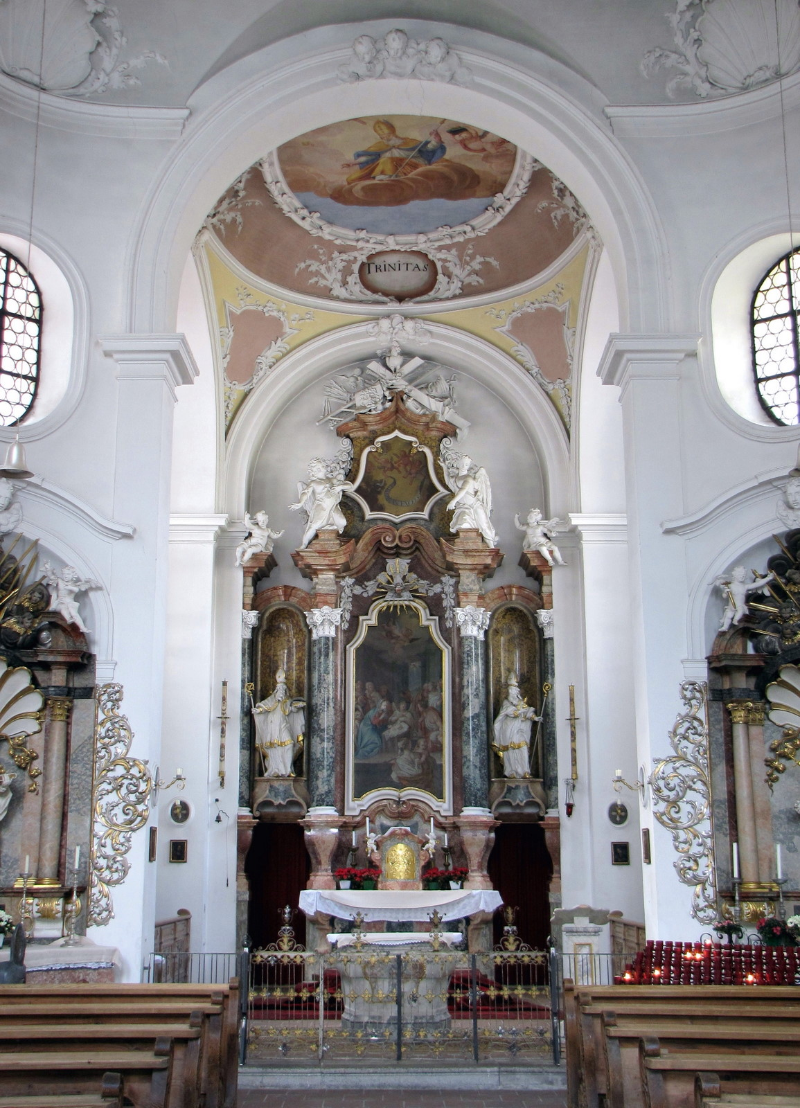 Stuckierung des Innenraumes in der Krippkirche Füssen von Thomas Seitz